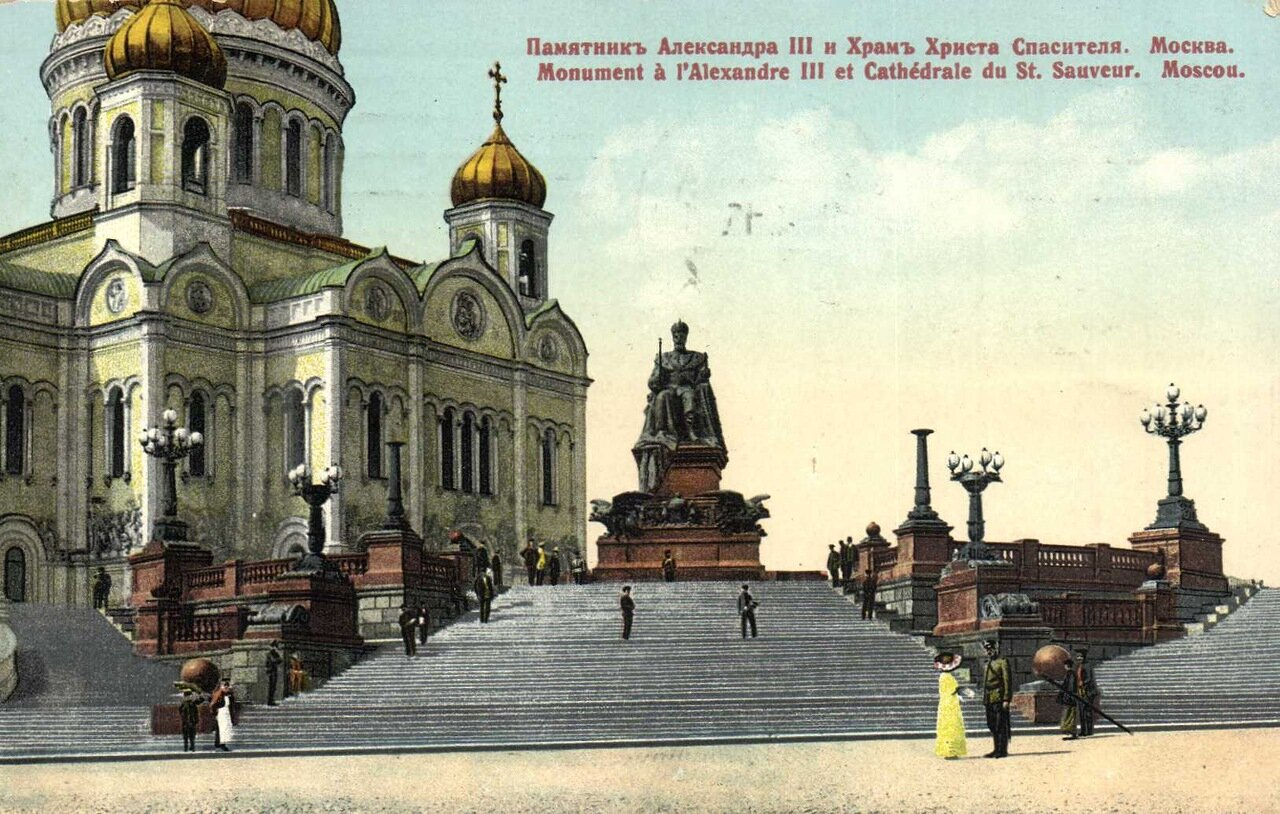 Carte postale du début du 20e siècle avec l'image de la cathédrale du Christ Sauveur et la statue d'Alexandre III